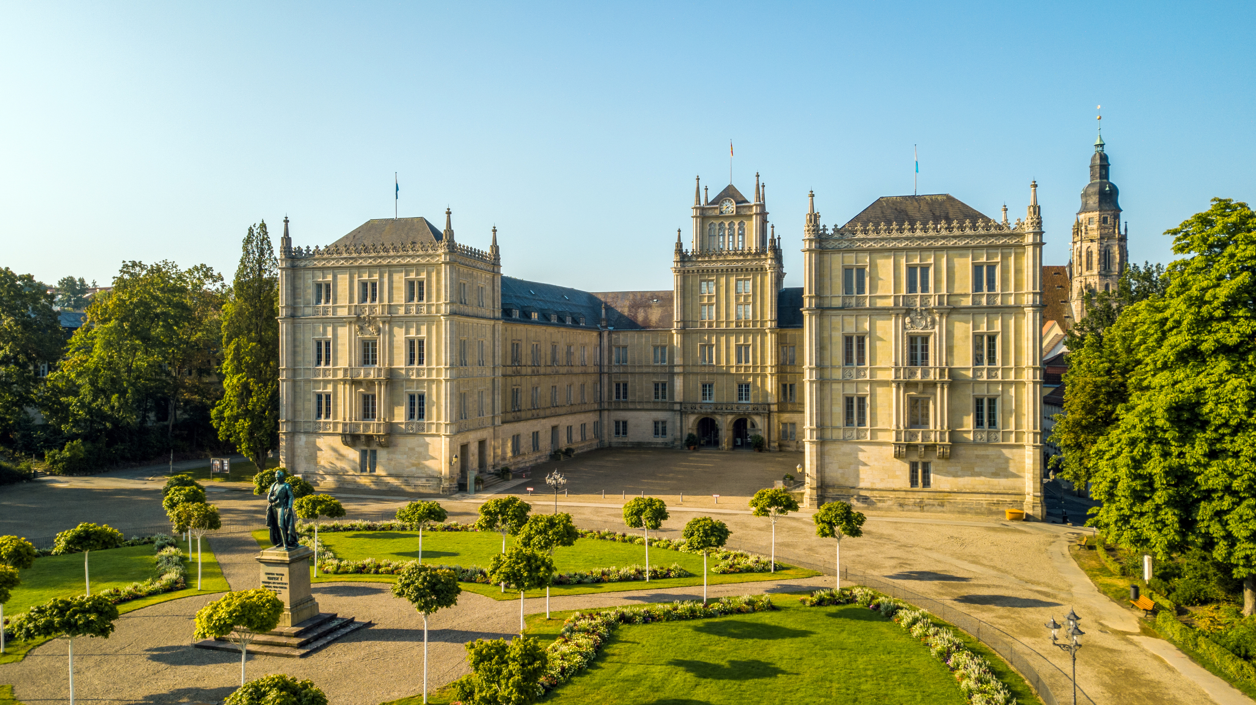 Schlossplatz in Coburg mit Ehrenburg und Stadtkirche St. Moriz im Hintergrund, aufgenommen im August 2019